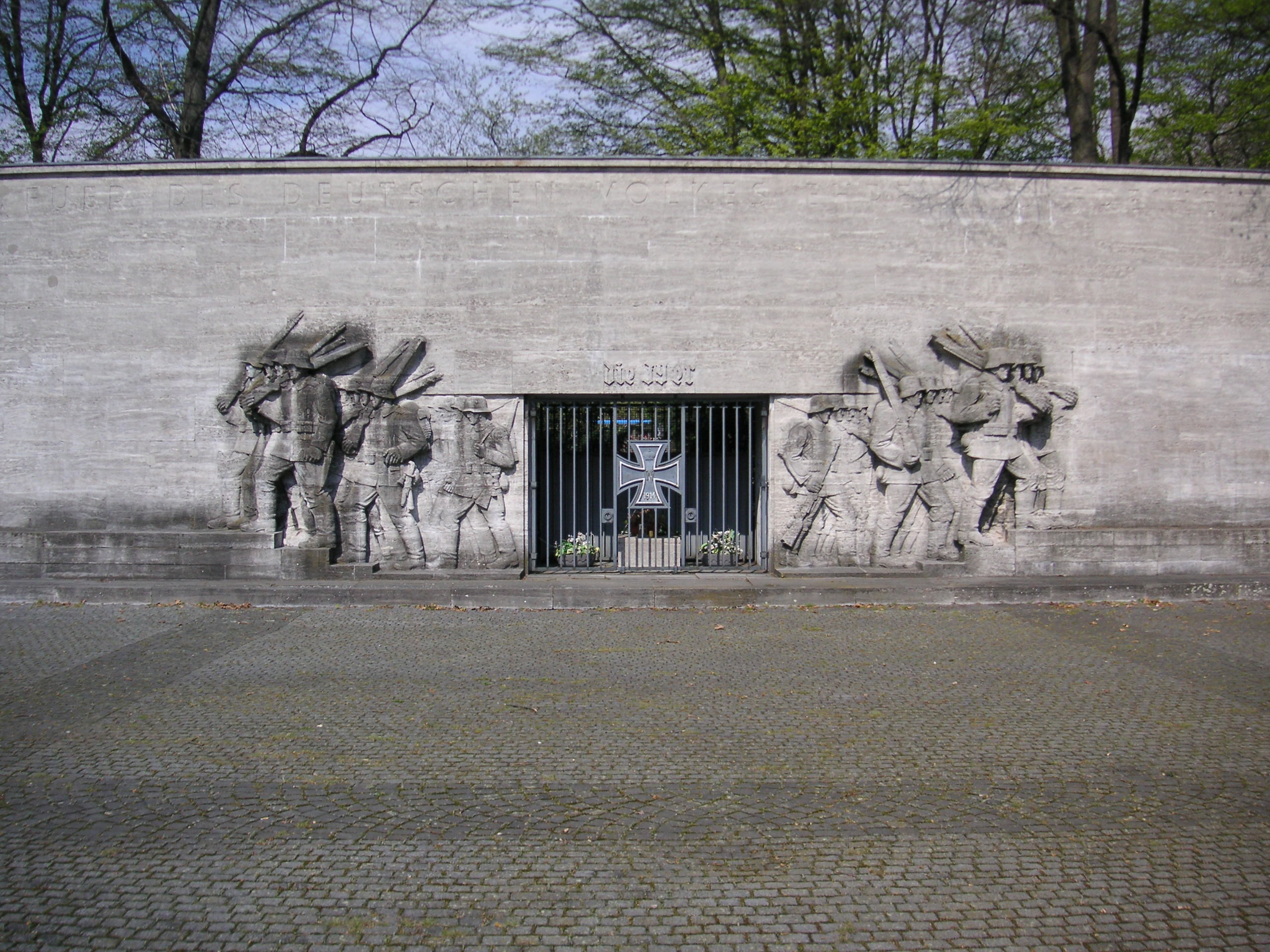 (zweites) Gefallenen-Ehrenmal des Niederrheinischen Füsilier-Regiments Nr. 39 in Düsseldorf-Golzheim, Reeser Platz; 1938 von Bildhauer Richard Kuöhl (Hamburg)